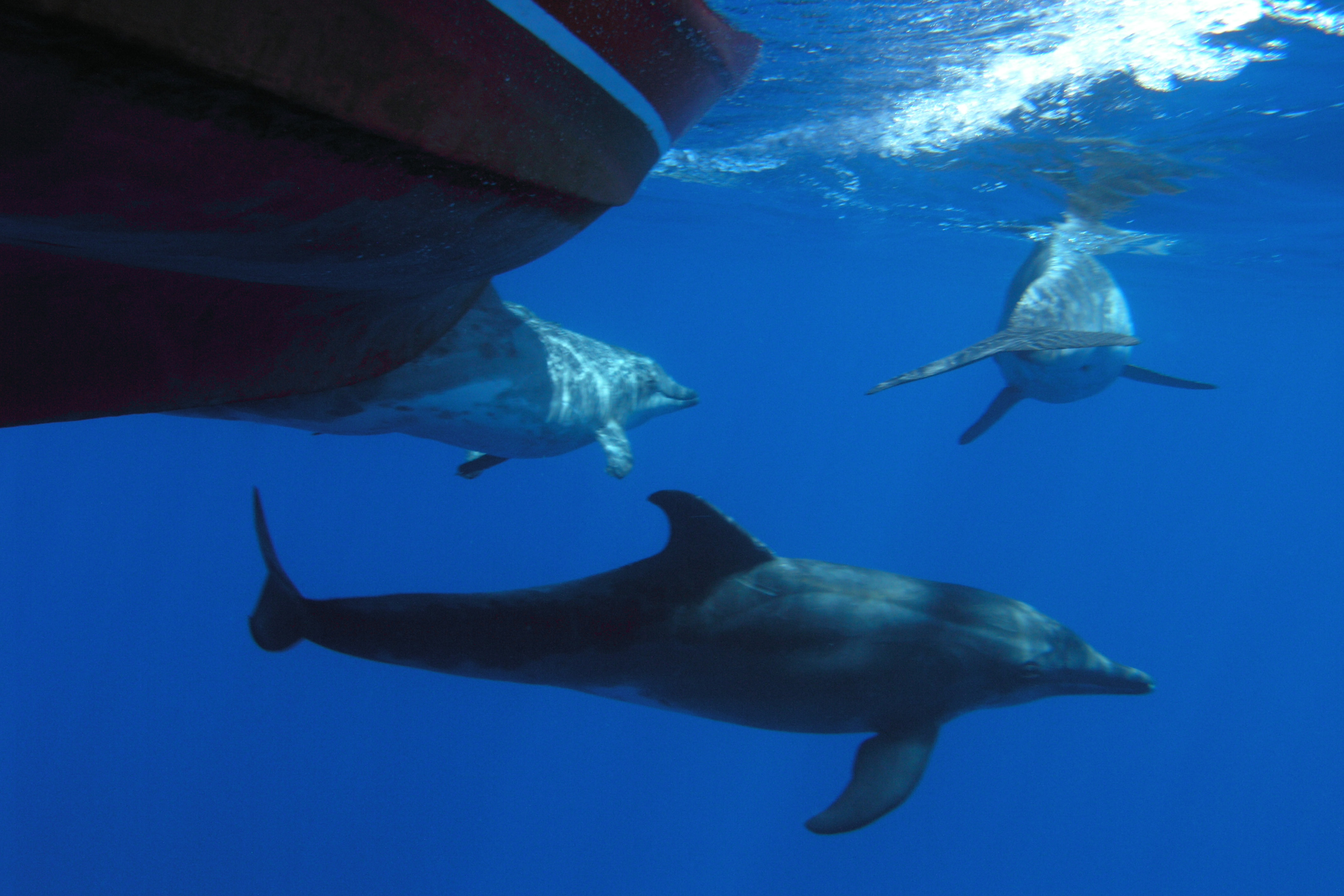 Rauzahndelfine (Steno bredanensis) reiten in der Bugwelle des Whale Watching Bootes